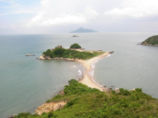 沙洲是一連島沙洲 於頂部攝